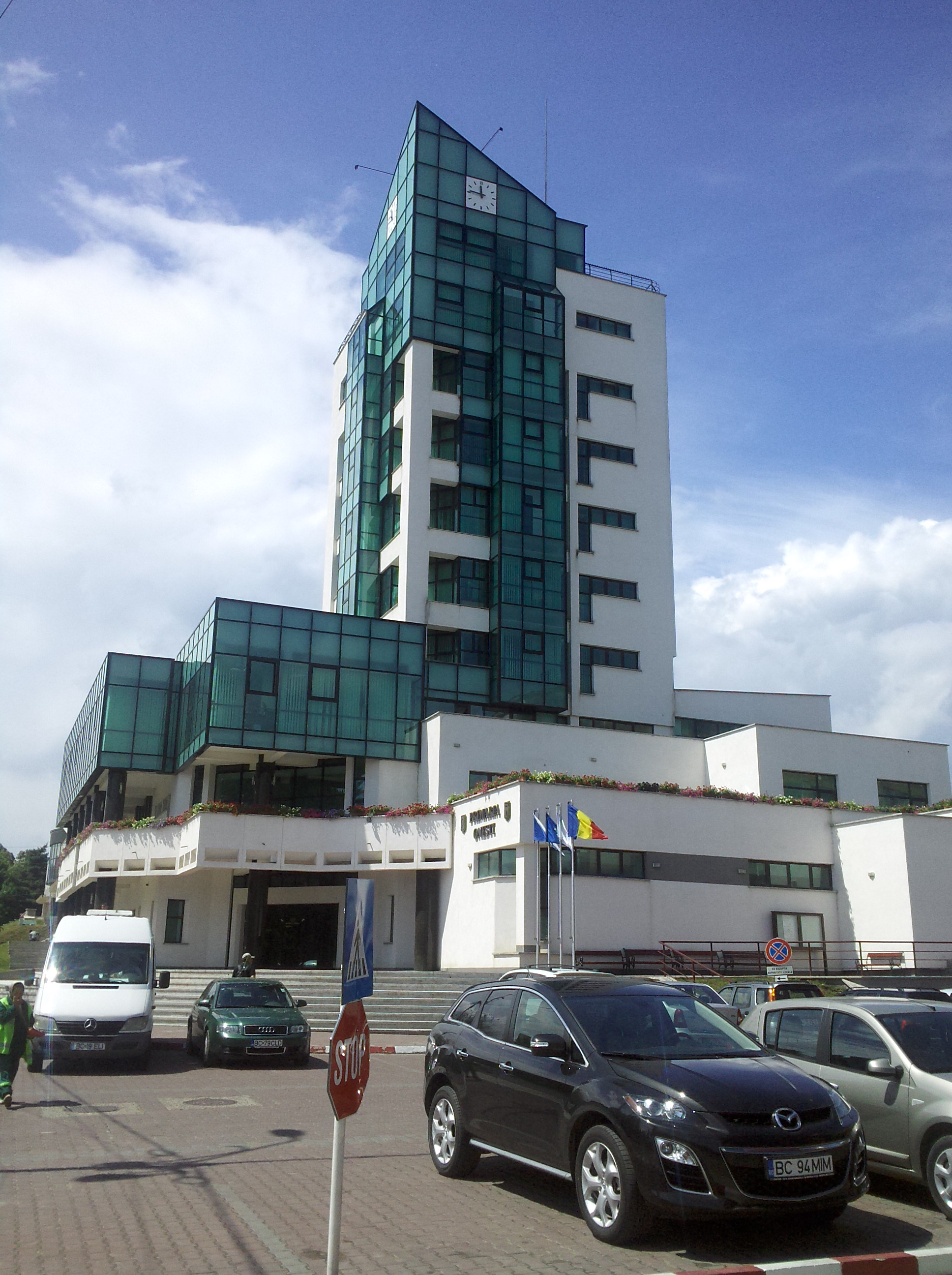 Primăria municipiului Oneşti.